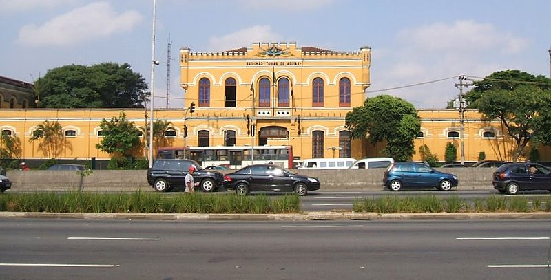 Quartel da Luz (Batalhão Tobias de Aguiar), no Bom Retiro, São Paulo, Brasil.